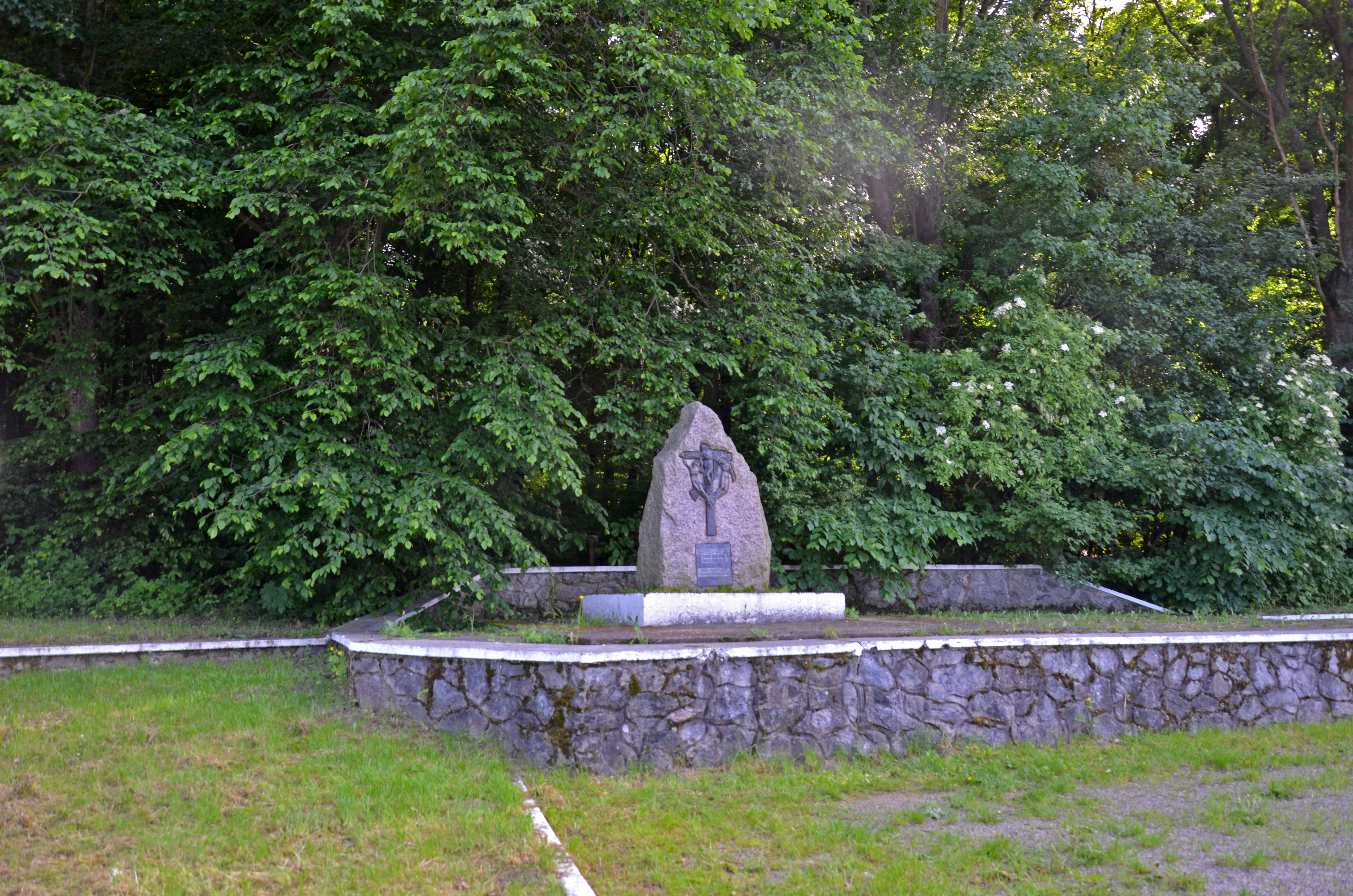 Парк-пам'ятка садово-паркового мистецтва (бл. 50 га), село Синява